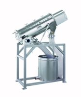 Flüssigsiebmaschine Typ FL der AZO GmbH + Co. KG